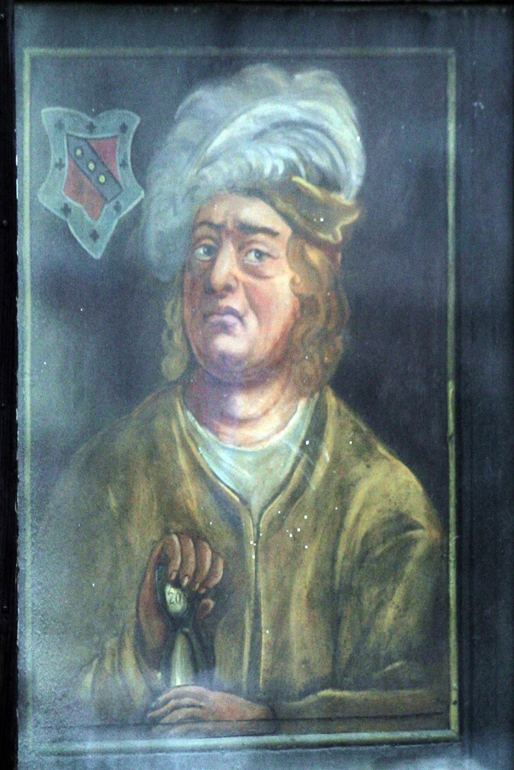 Bild des Arztes Philippus Theophrastus Aureolus Bombastus von Hohenheim